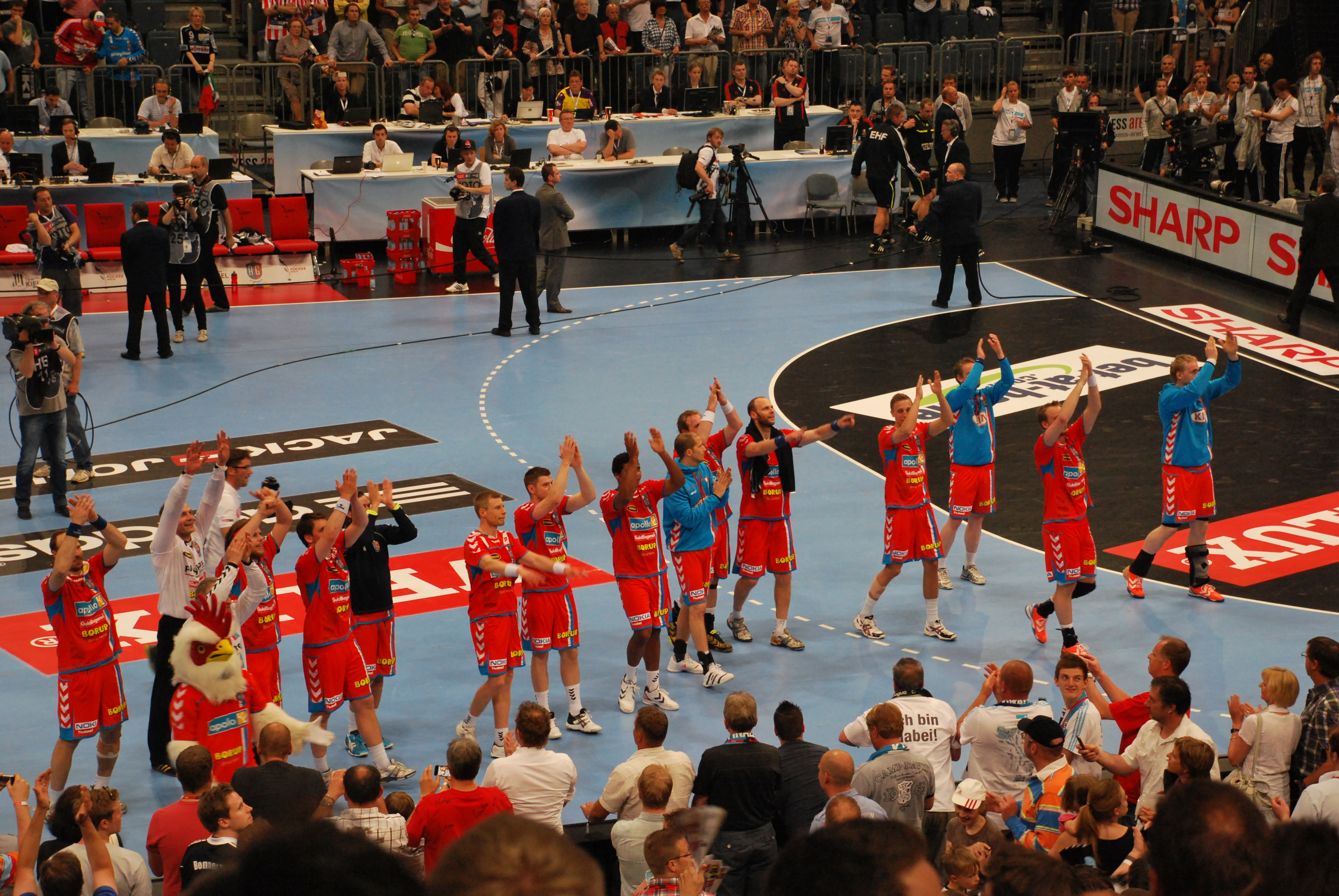 AG København nach dem Spiel um Platz 3&4 beim Final Four 2012.